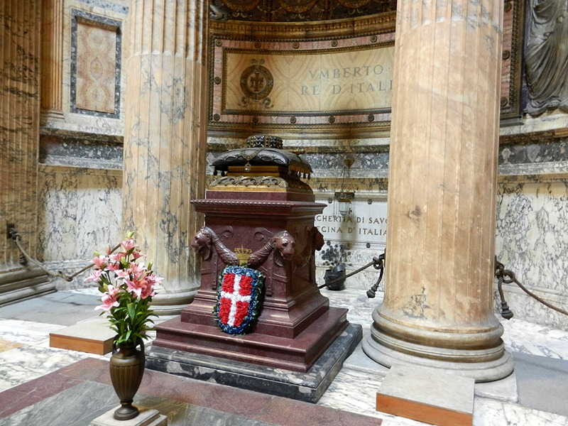 Roma - Tomba del re Umberto I nel Pantheon